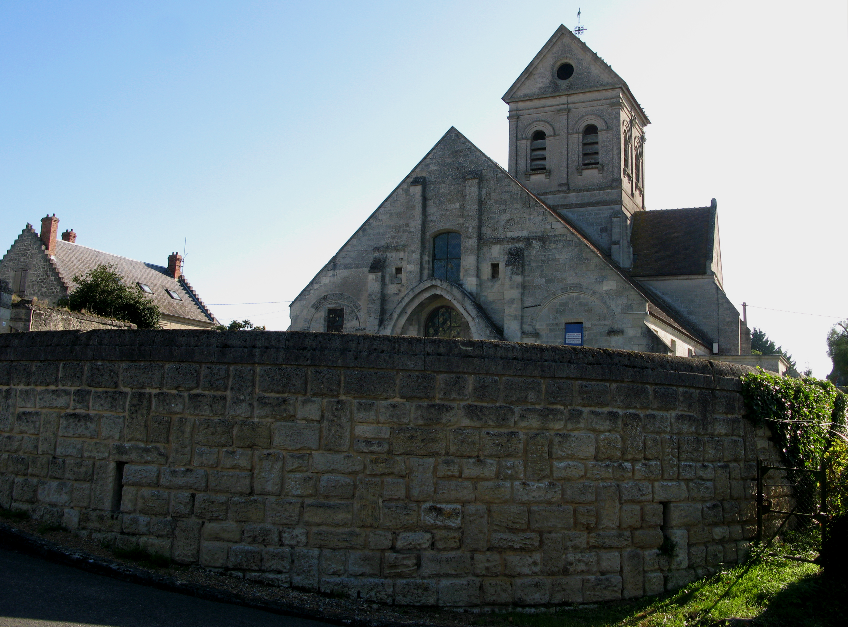 Cuisy-en-Almont (Aisne, France) - L'église, en surplomb par rapport à ce côté de la rue, aperçue derrière le mur robuste délimitant l'ancien cimetière. (Ma photo d'origine étant légèrement sur-exposée, j'ai peut-être un peu trop forcé son "assombrissement" lors du post-traitement numérique.) .